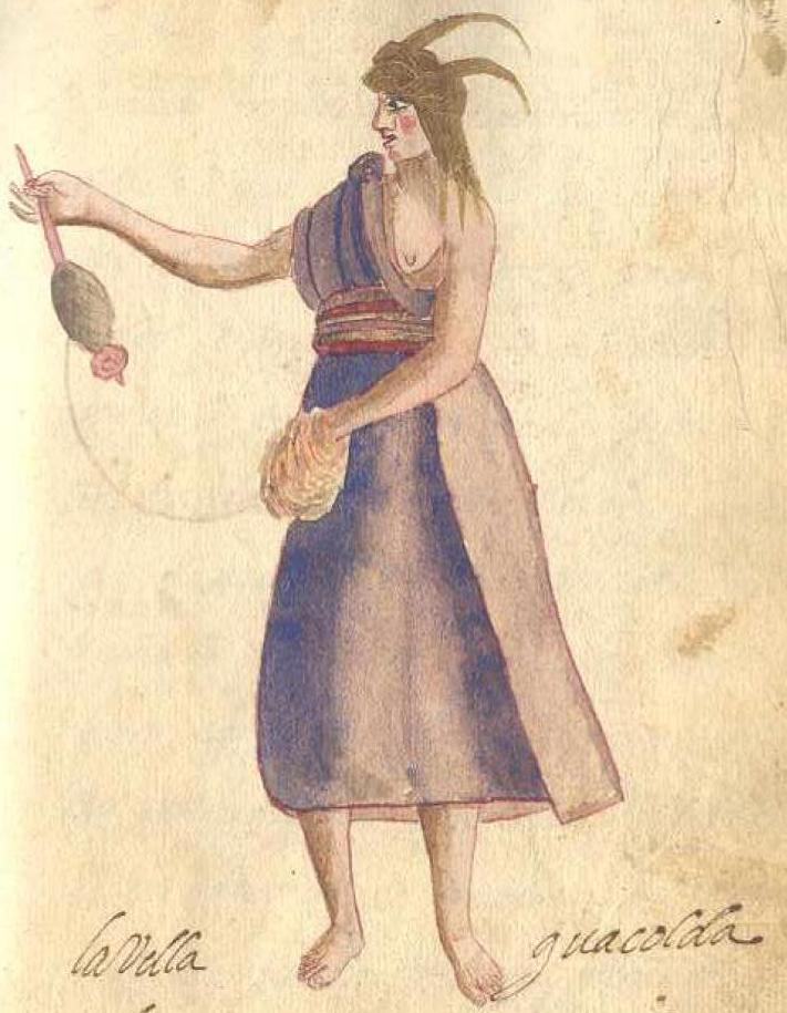 Guacolda mujer mapuche. La existencia de Guacolda, mujer de Lautaro —así como la de Fresia, mujer de Caupolicán—, es materia de discusión puesto que mientras para unos es sólo una leyenda, para otros se trata de una persona real.